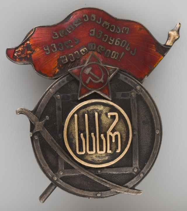 Орден Красного Знамени Грузинской ССР учрежден постановлением ЦИК Грузинской ССР в 1923 году.